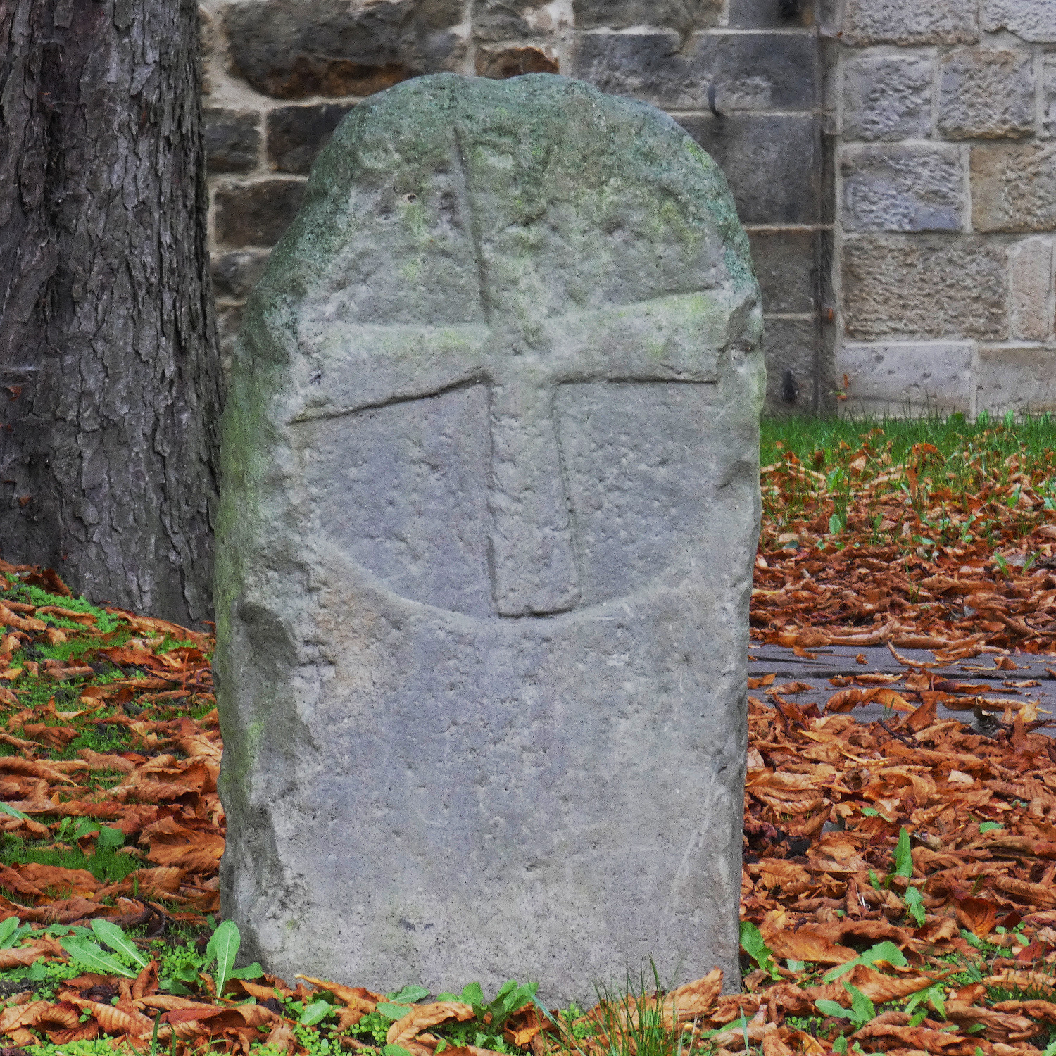 Die Kreuzsteine, oder früher die 5 Steine, sind eine Gruppe von Kreuzsteinen in Hiddestorf, einem Stadtteil von Hemmingen in der Region Hannover in Niedersachsen